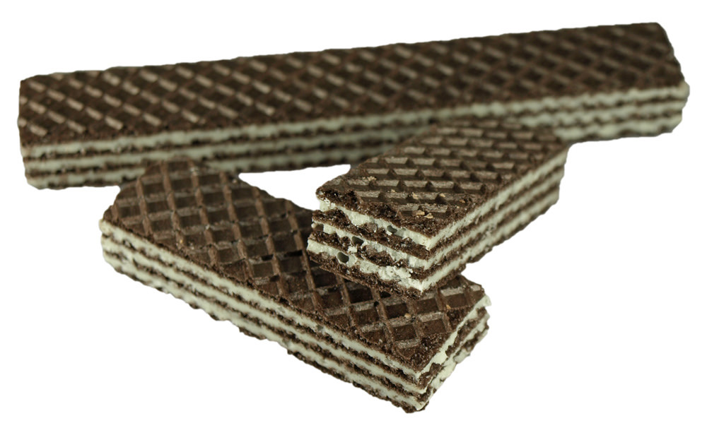 Weitere Informationen hier